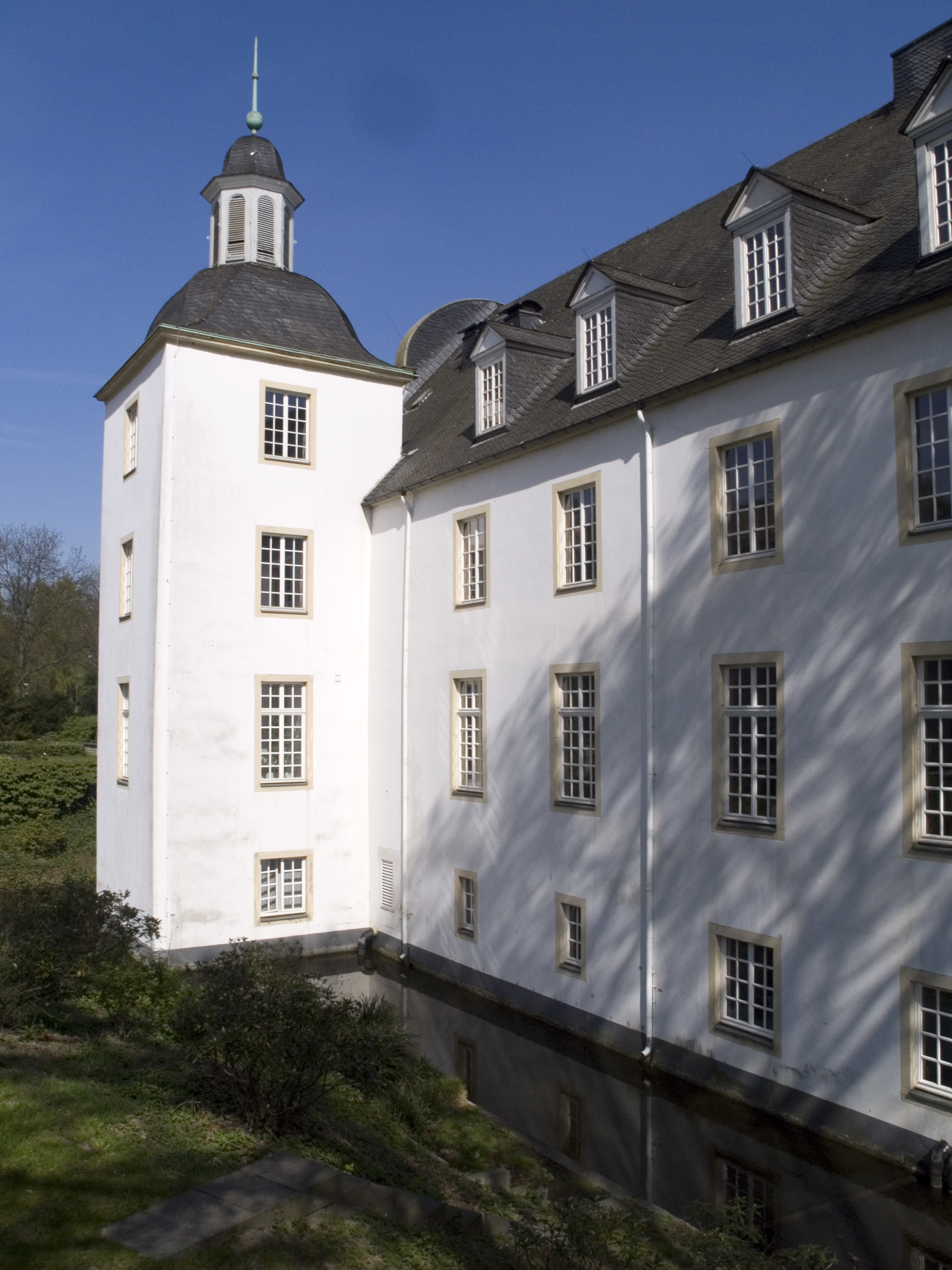 Северный Рейн - Вестфалия, Эссен - замок Борбек